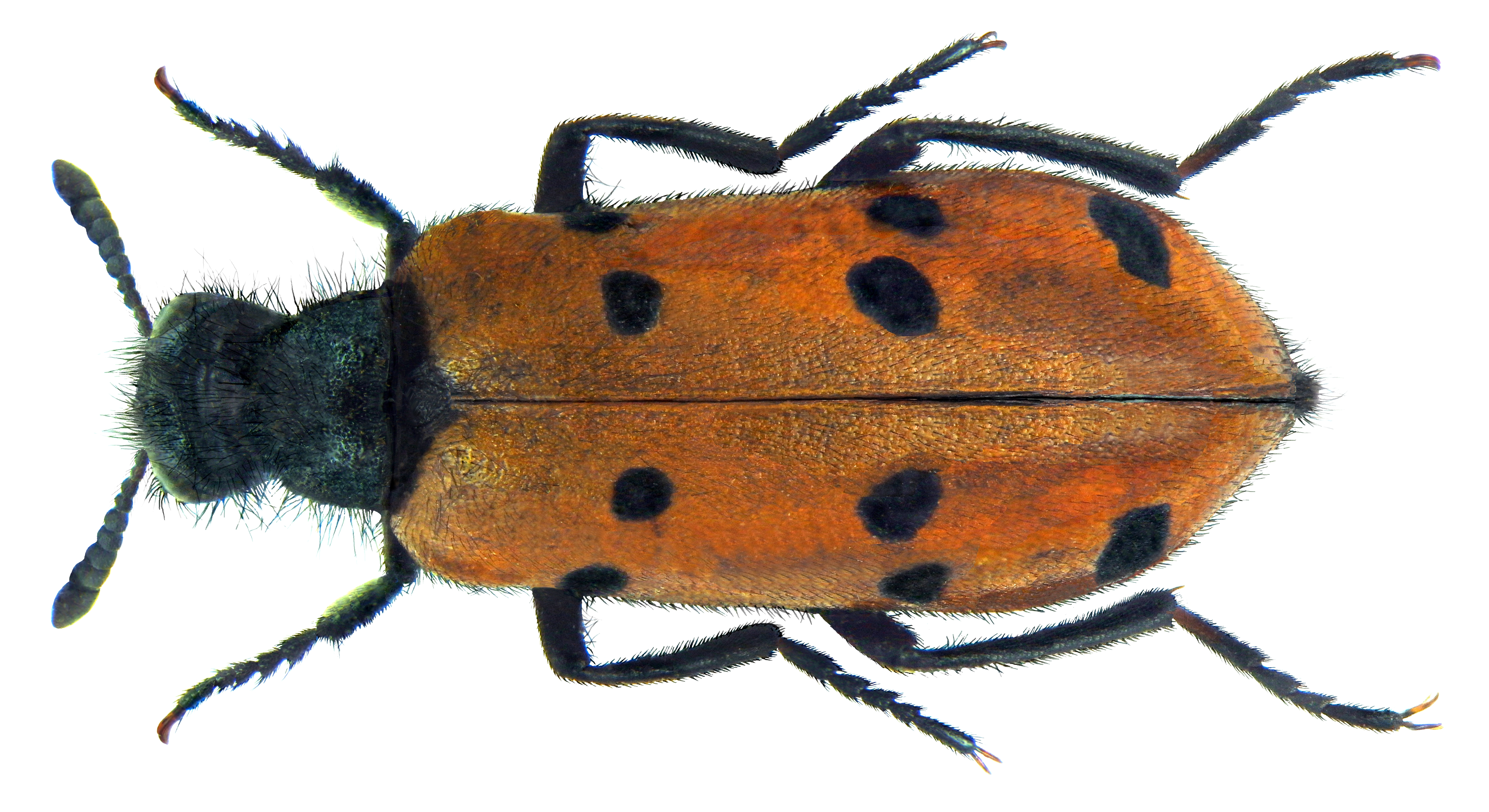 Hycleus duodecimpunctatus (Olivier, 1811) Familie: Meloidae Groesse. 14,8 mm Fundort: Spanien, Almeria, Roquetas, Salinas de Rafael leg. J.Scheuern, 26.IV.1987; det. U.Schmidt, 2011 Photo: U.Schmidt, 2011